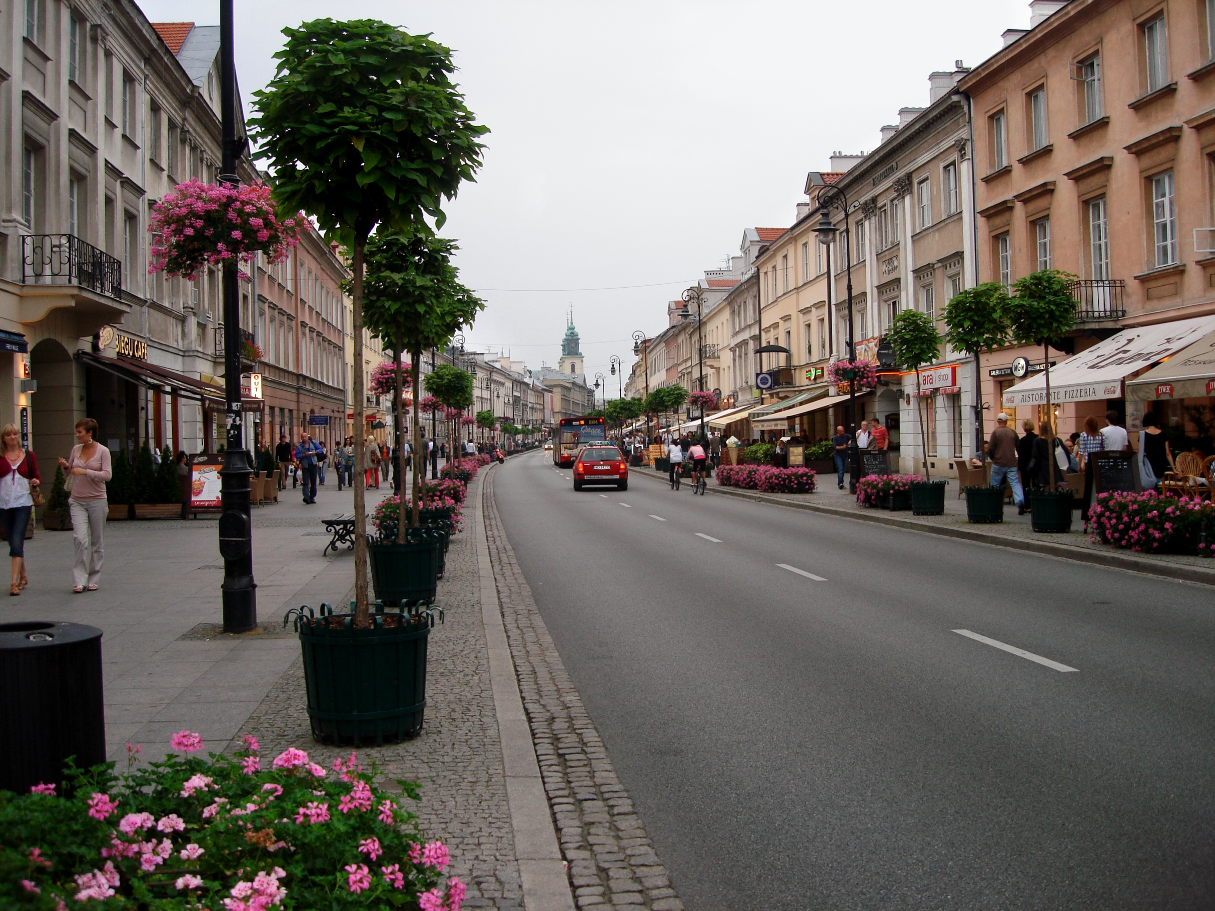 Warszawa - Warsaw - Varsovie - Warschau - Varsovia - Varsó - Варшава